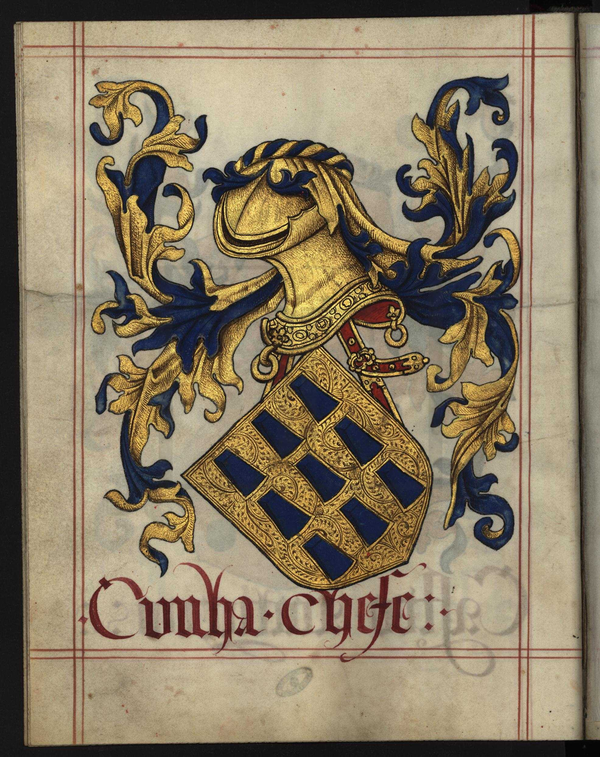 Livro do Armeiro-Mor, Cunha (fl 51v)